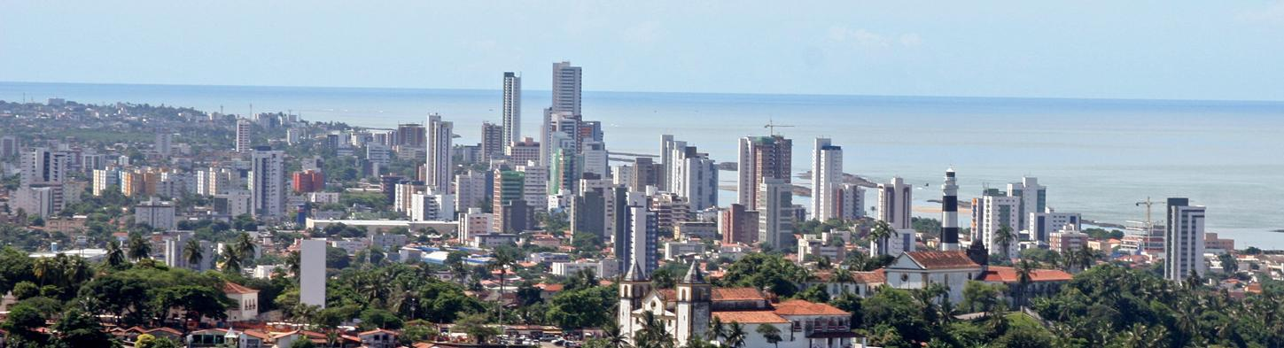 Foto: Antônio Melcop/Pref.Olinda